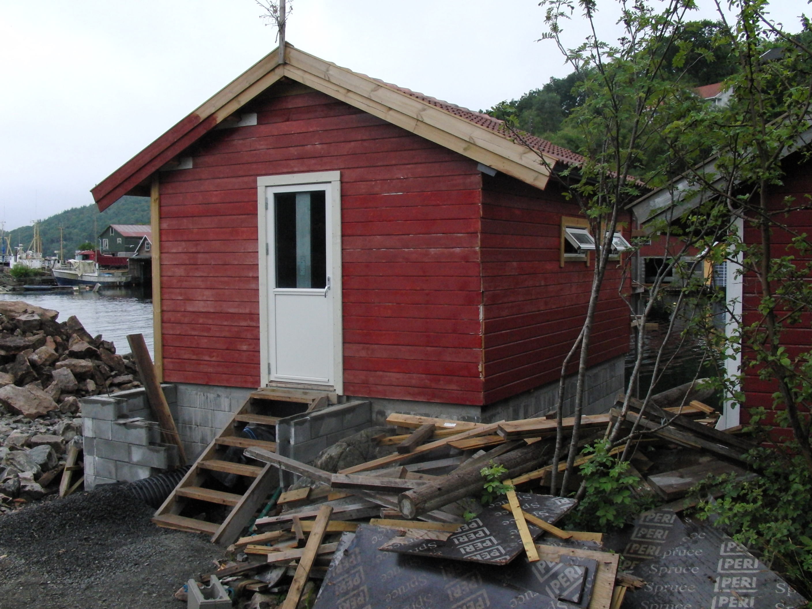 Ramsland kraftverk